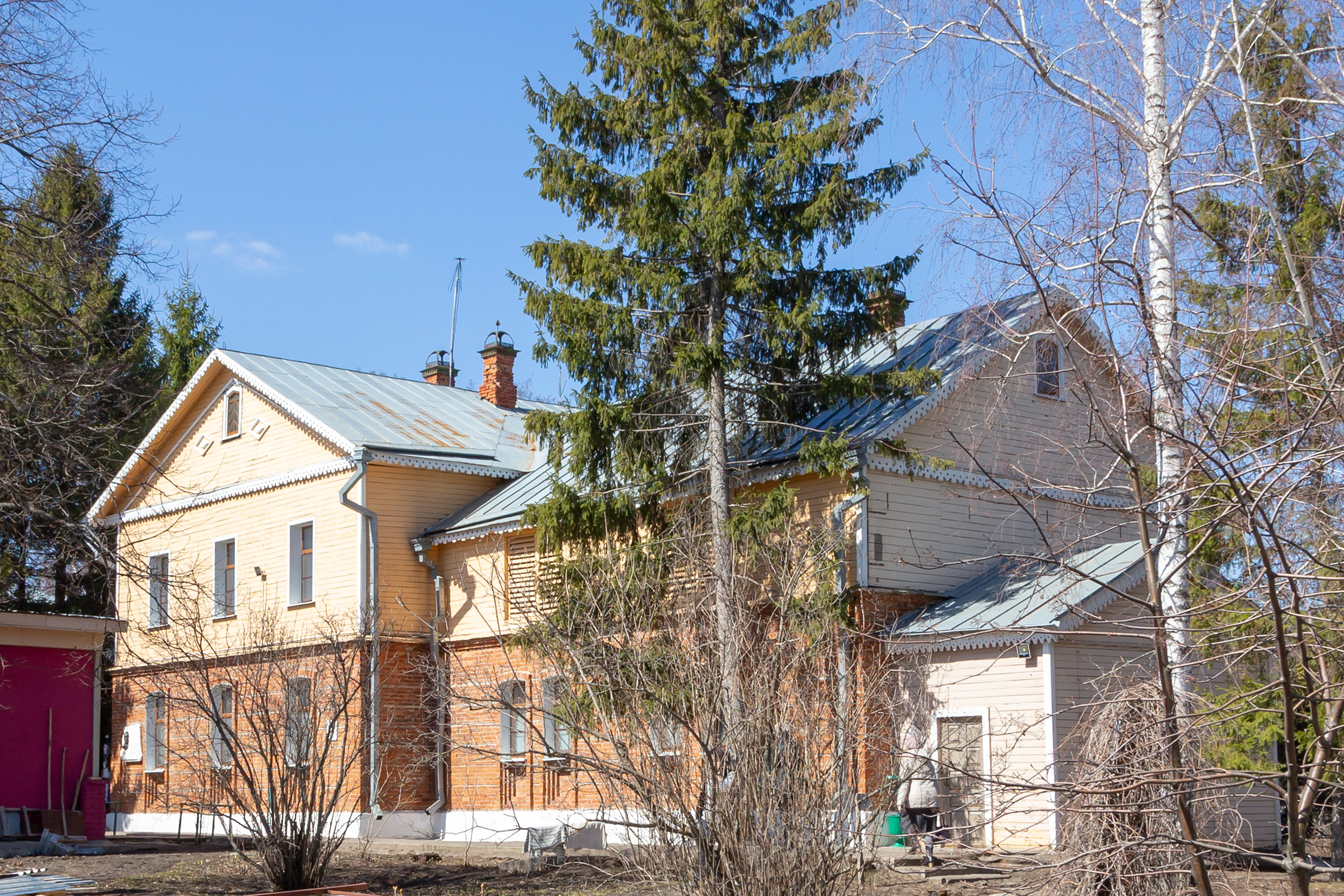 Флигель: Ивановка, Уваровский район, Тамбовская область